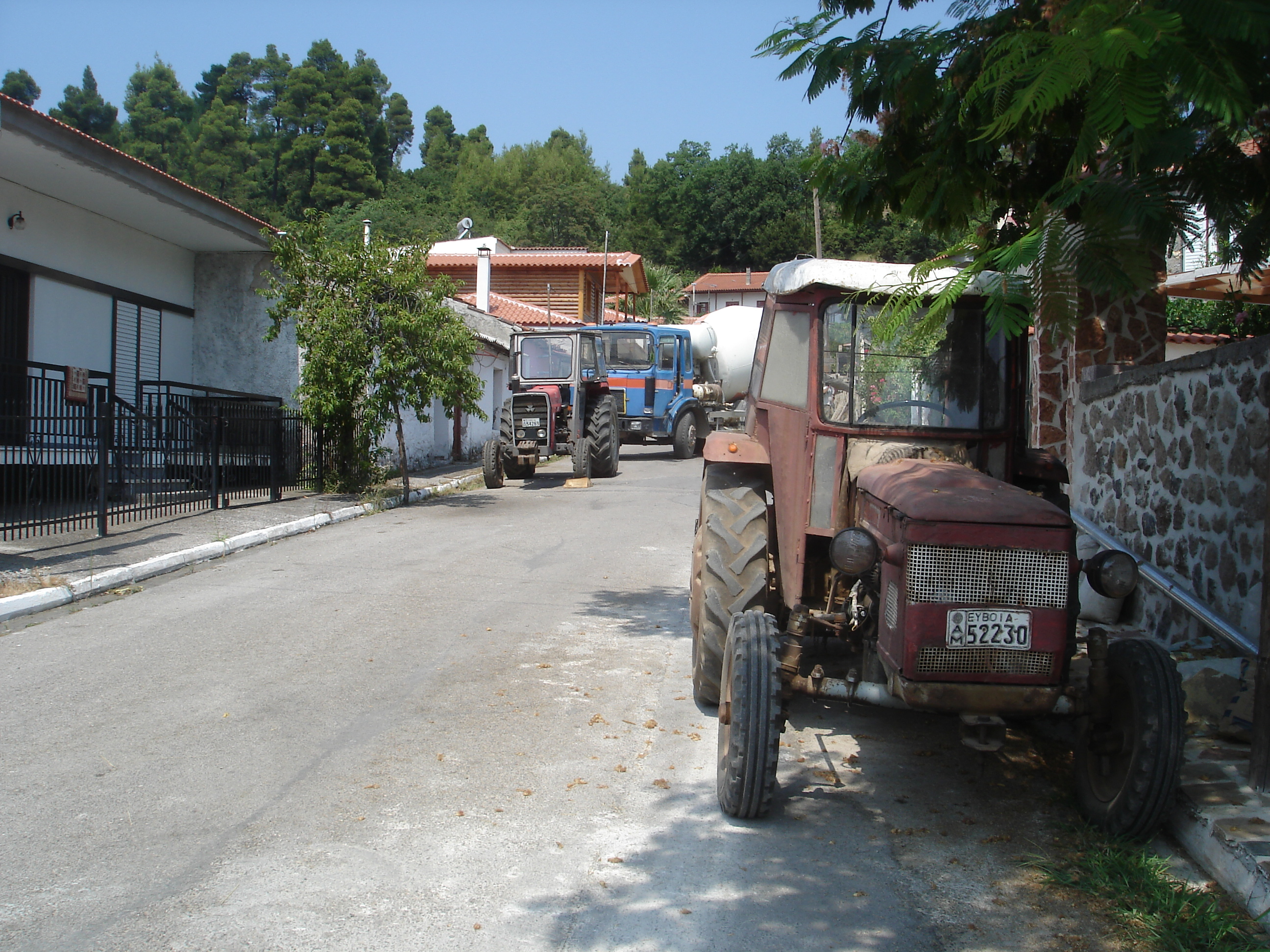 Rue de Prokopi sur l'ile d'Eubée (Greece)